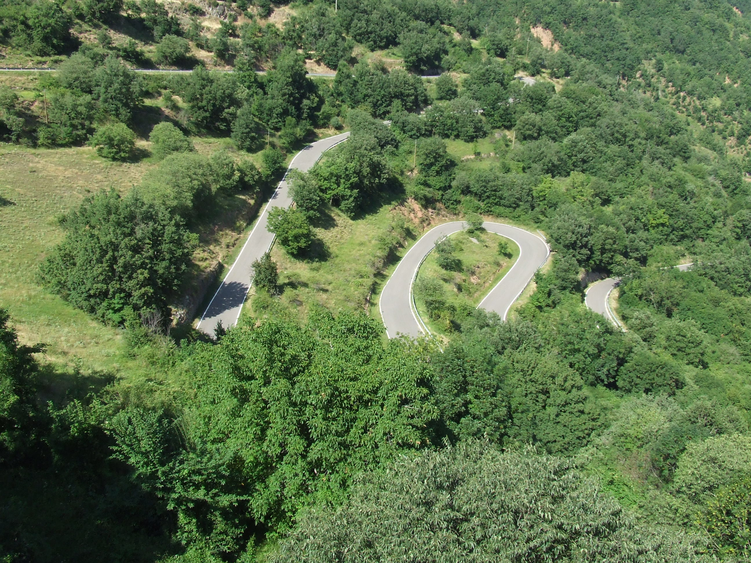 La L-521, a Sarroca de Bellera (Pallars Jussà)